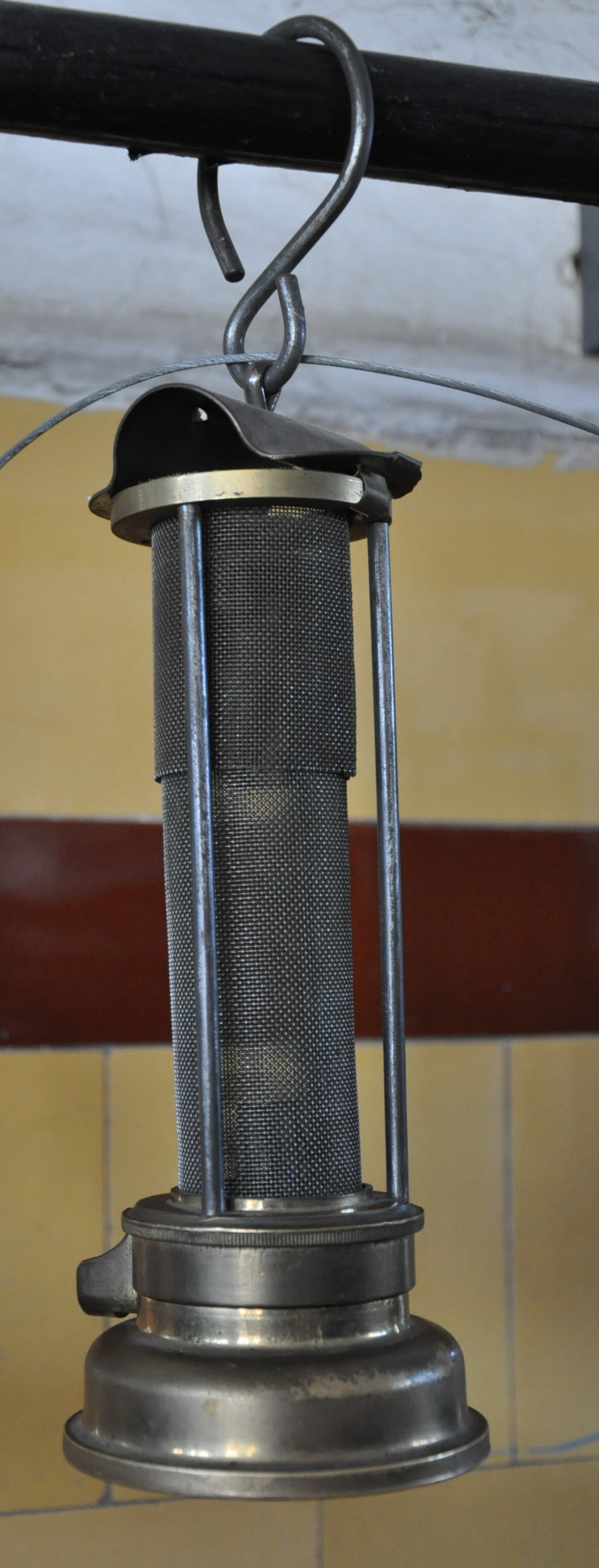 Replika Davyho bezpečnostní olejové lampy. Důl Michal, Ostrava.